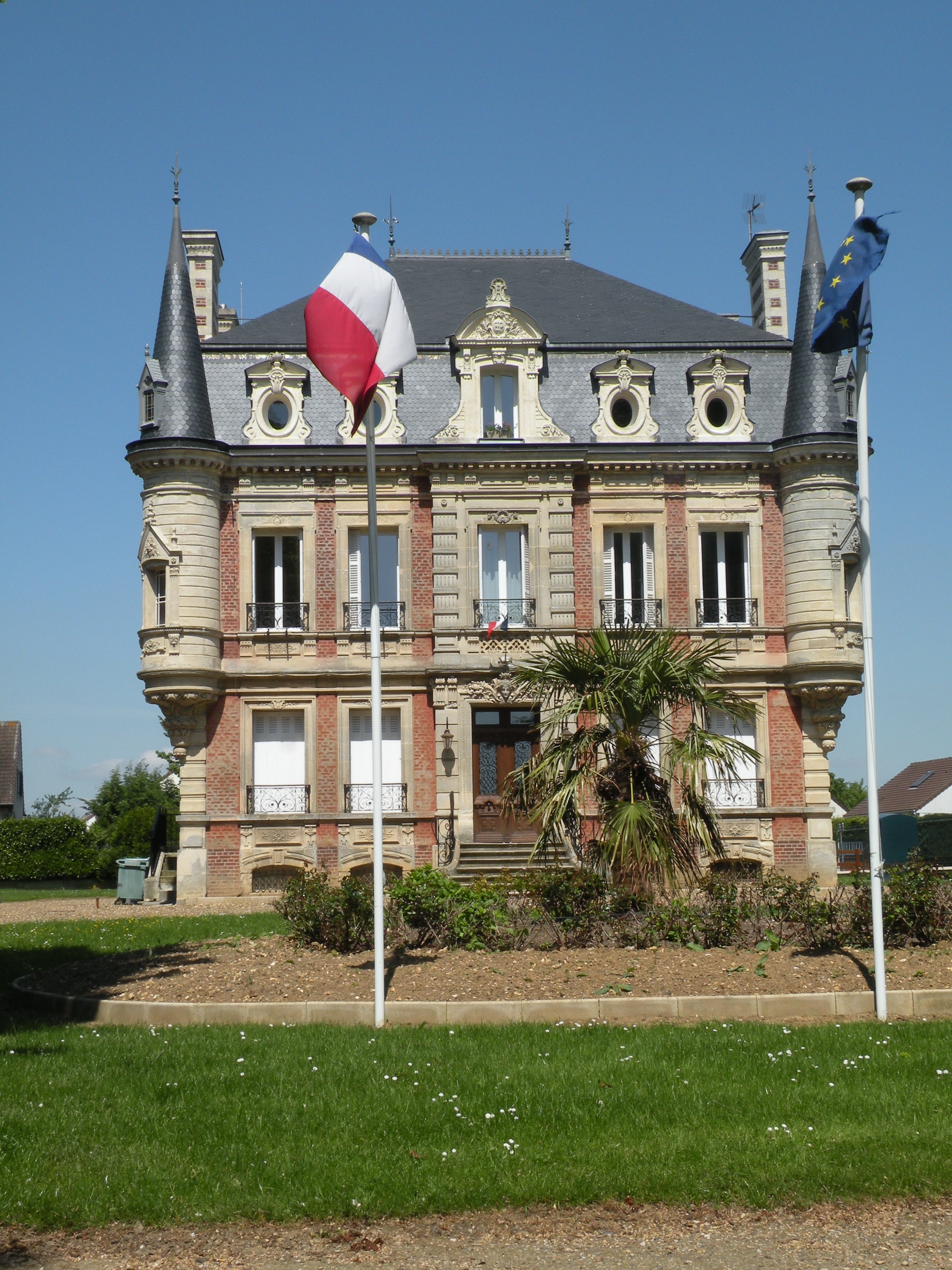 mairie